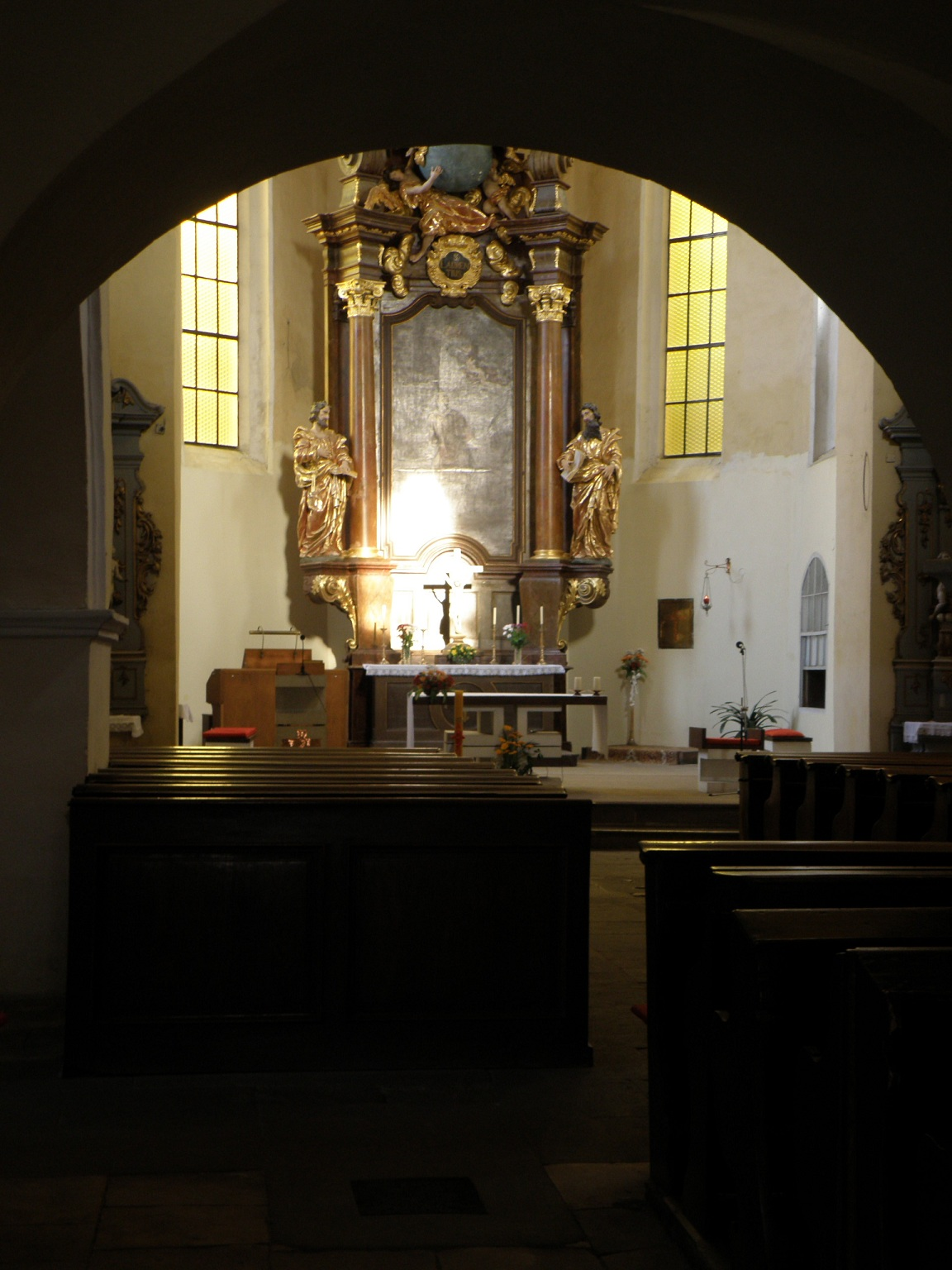 Kostel sv. Petra a Pavla, Bílina, okres Teplice